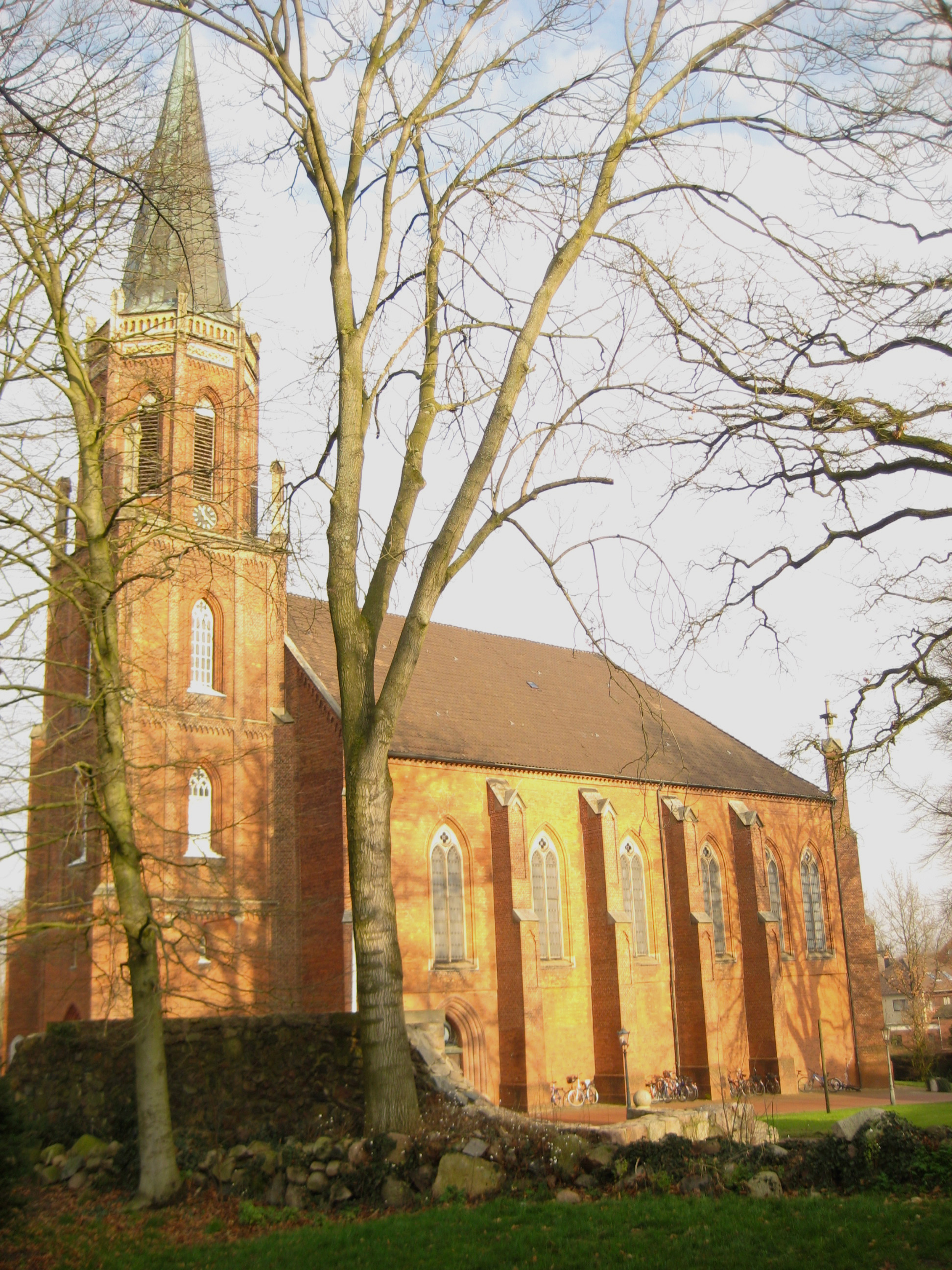 Kirche St. Marien und Bartholomäi in Harsefeld